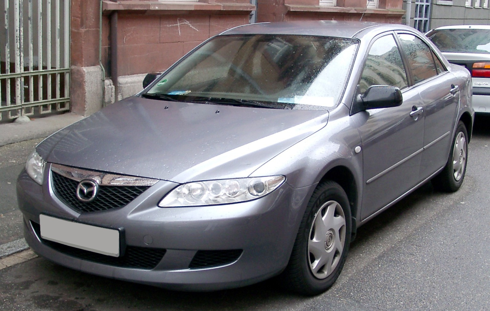 Mazda 6